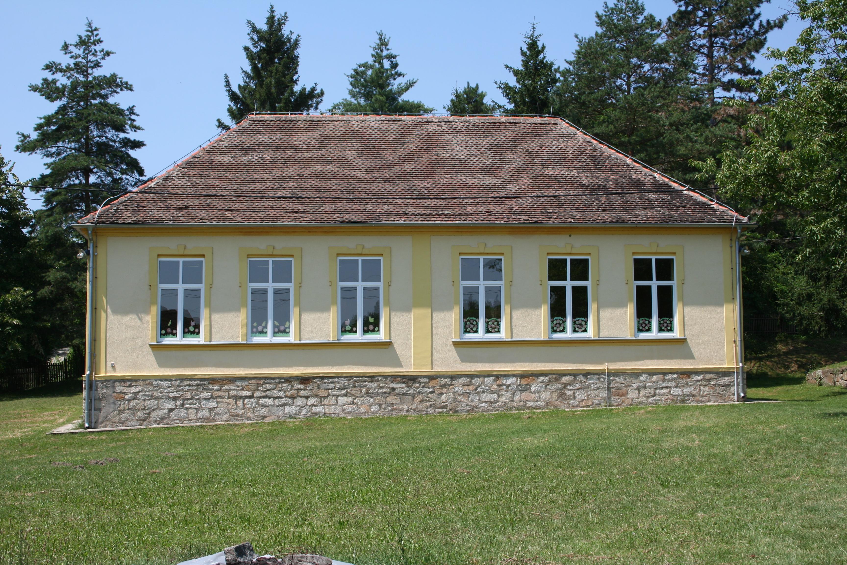 Zgrada škole, Rumska